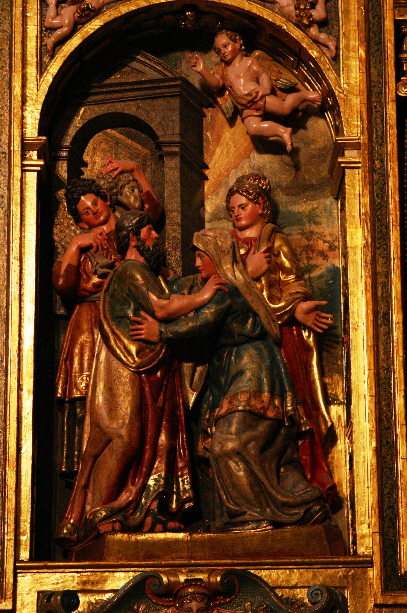 Interior da Catedral